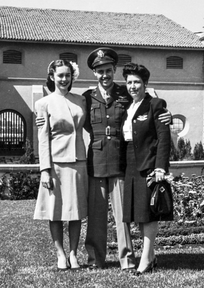 Martha Joy Young, Mario Gottfried y María Gutiérrez Zertuche, en 1945 Fuente: Potencia Industrial, S.A. Fecha: 1945 (Archivo derivado=2014) Autor: Enrique Guillermo Gottfried Zender (1886-1955)